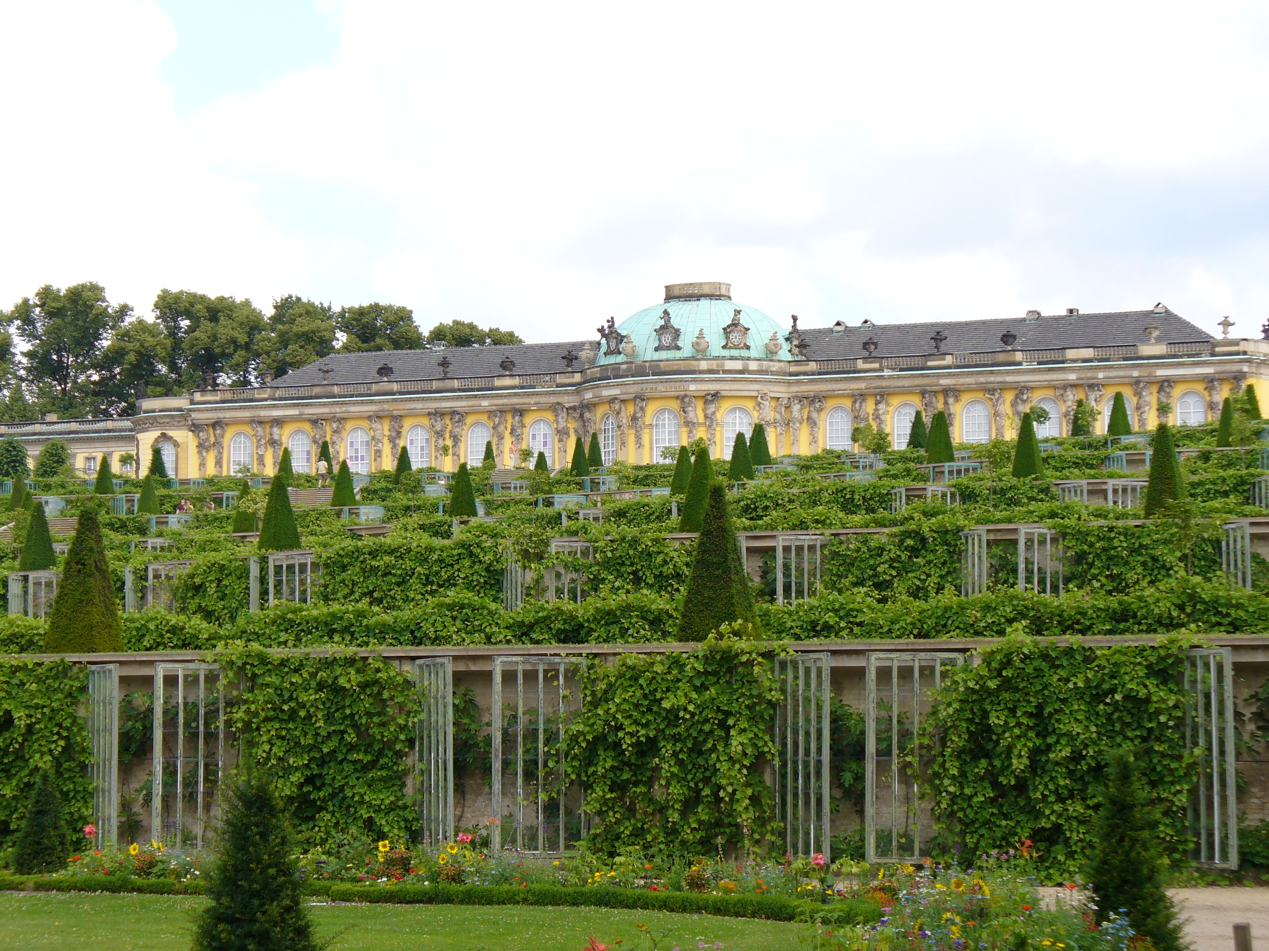 Schloß Sanssouci(frz.sans souci = ohne Sorge) am Hang eines Weinberg 1745-1747 - Architekt Georg Wenzeslaus von Knobelsdorff